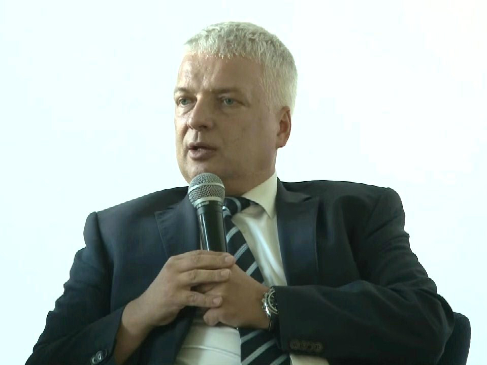 Dr hab. Robert Gwiazdowski, prawnik i wolnorynkowy komentator gospodarczy.